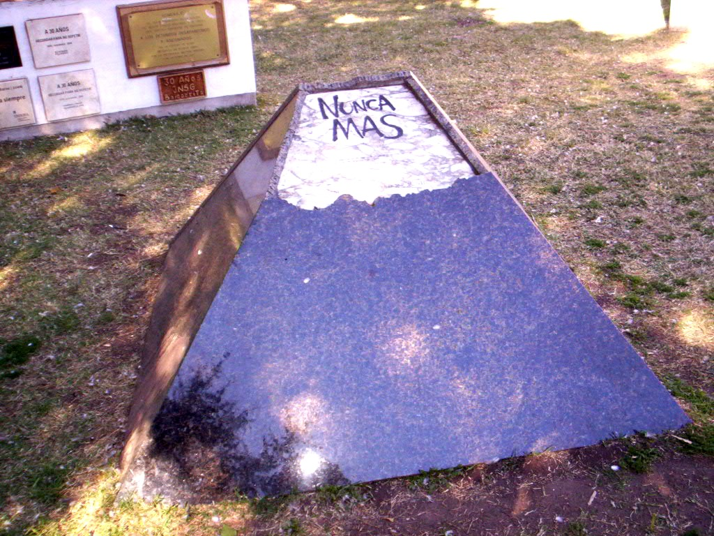 Monumento a la Memoria ubicado en la plaza 25 de Mayo de Junín, Argentina, en homenaje a los desaparecidos durante el gobierno militar de 1976. Lleva la leyenda de "Nunca Más" y fue realizado por el arquitecto juninense Salvador Roselli.